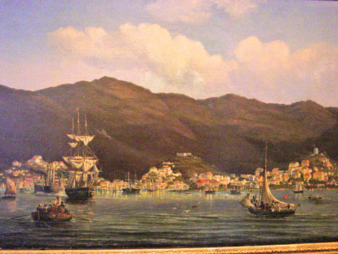 Le port de Saint Thomas dans les Caraïbes en 1850 avec 2 navires de la Royal Mail Steam Packet Company, 17 ans avant le cyclone de 1867